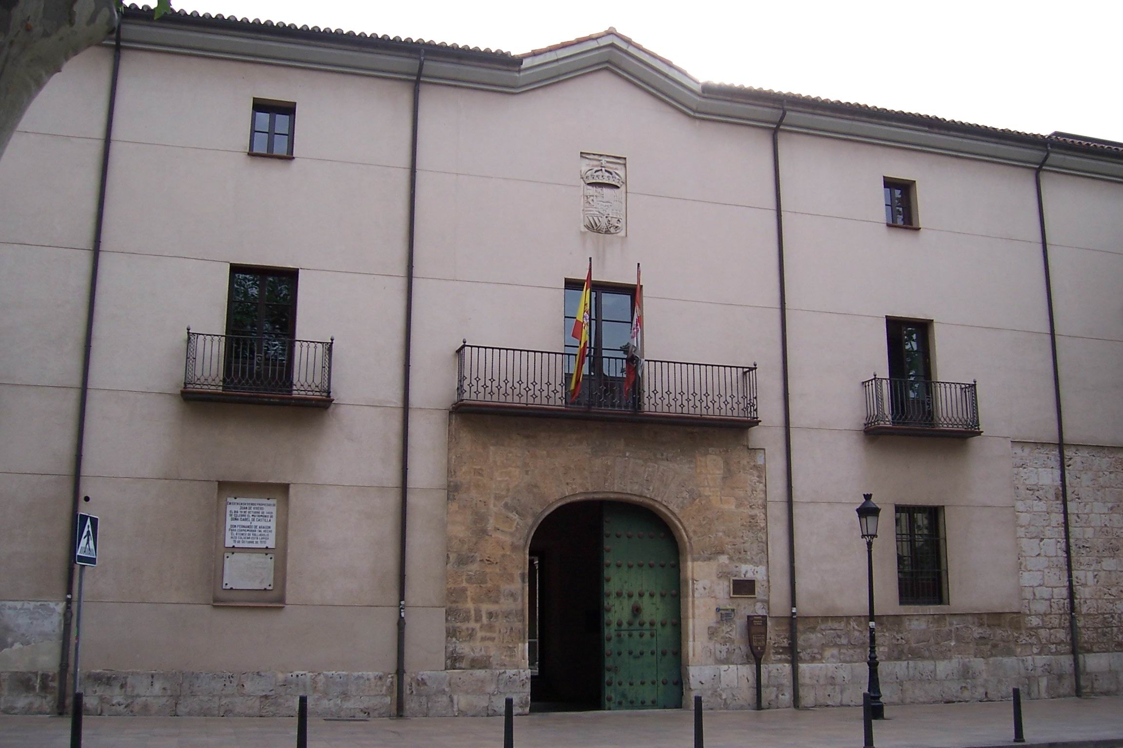 Fachada principal del palacio de los Vivero fue construido a mediados del siglo XV para don Alonso Pérez de Vivero, Contador Mayor de Juan II. En una de sus estancias, la llamada Sala Rica, firmaron compromiso de matrimonio el 14 de octubre de 1469 los Reyes Católicos, uniéndose así las Coronas de Castilla y Aragón. En el siglo XXI alberga el Archivo Histórico Provincial de Valladolid